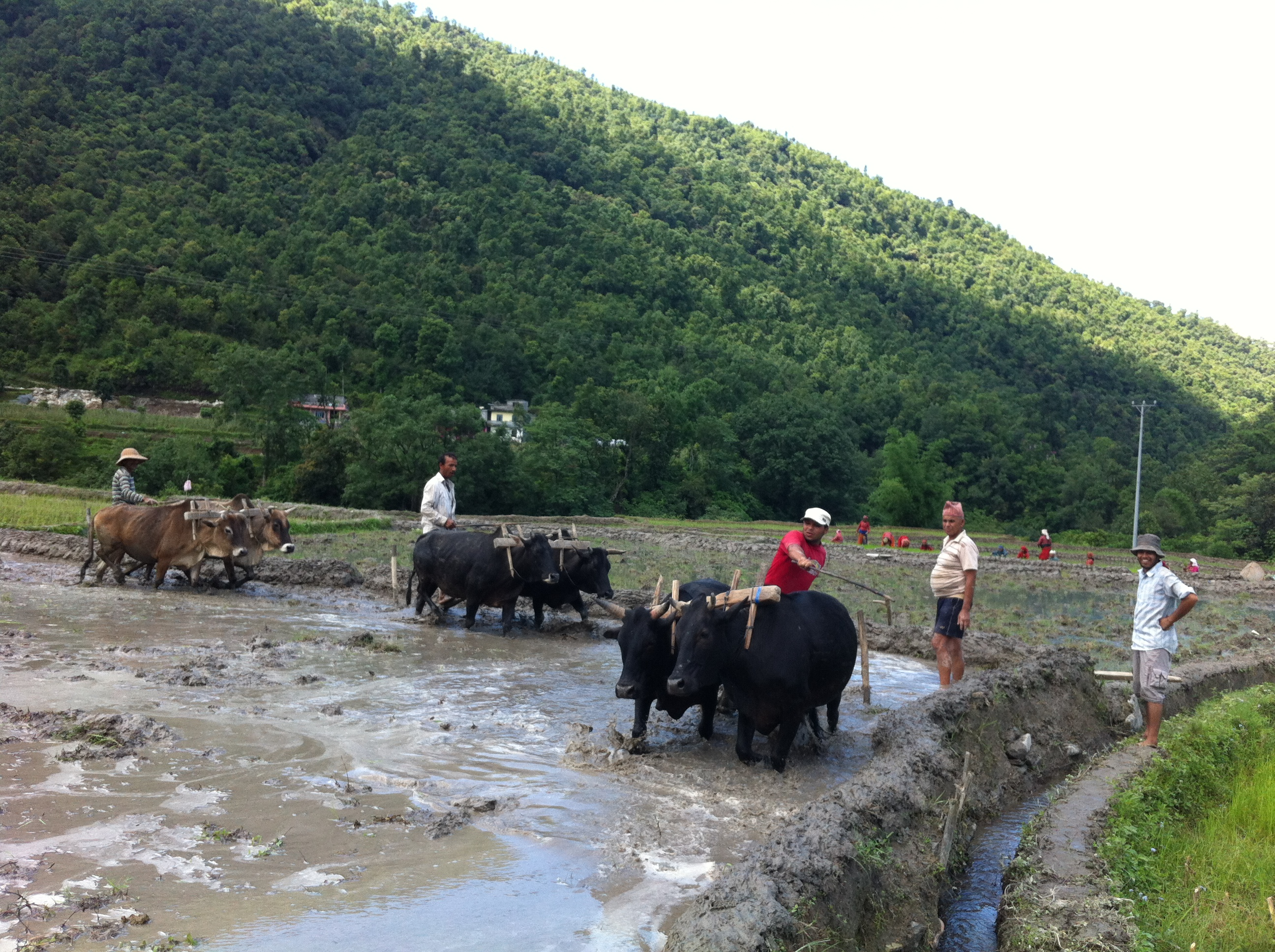 असारे रोपाई भलाम गा वि स